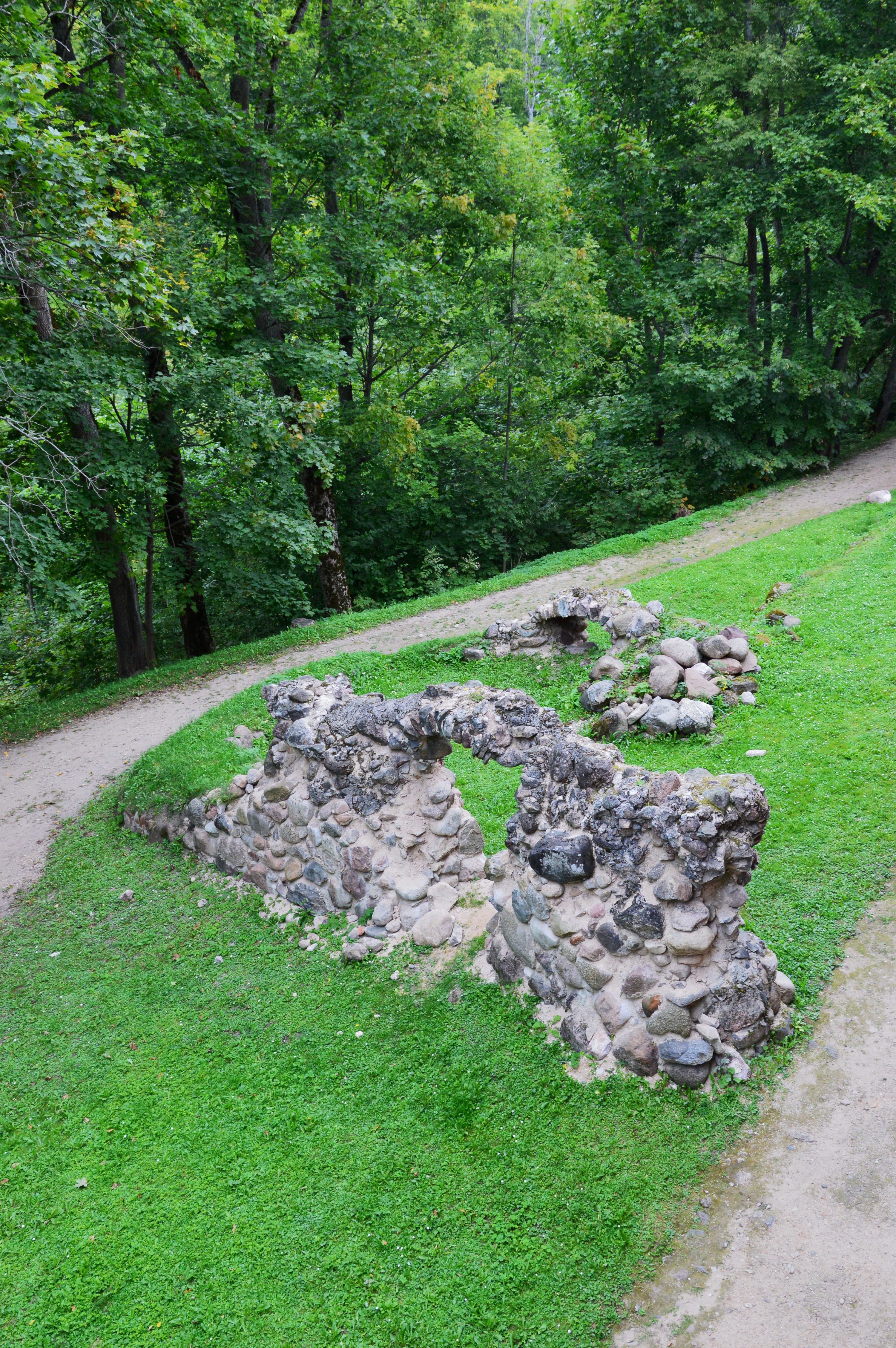 Cesvaine piiskopilinnuse varemed